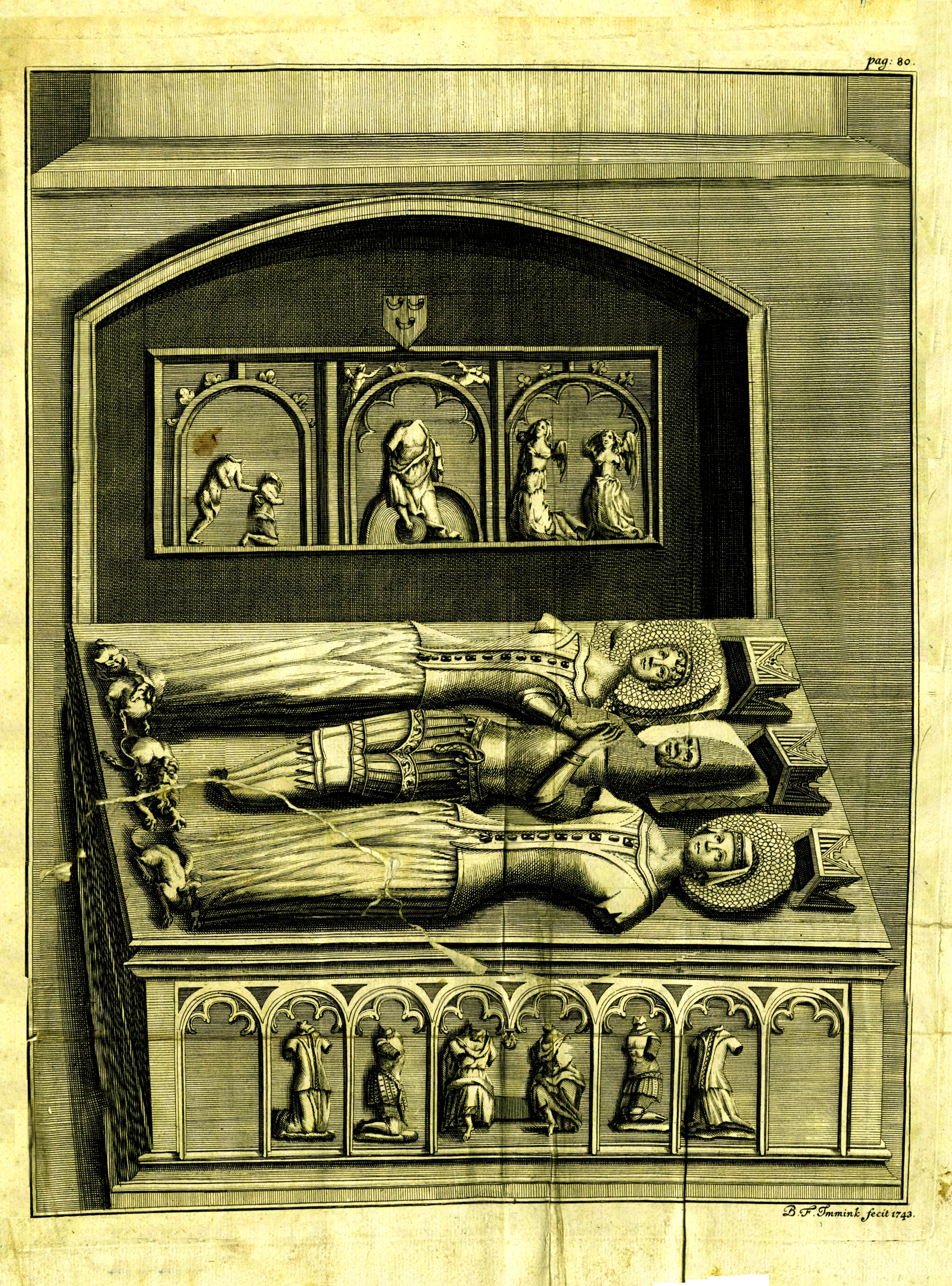 Graf van Jan II van Polanen naar een gravure uit 1743